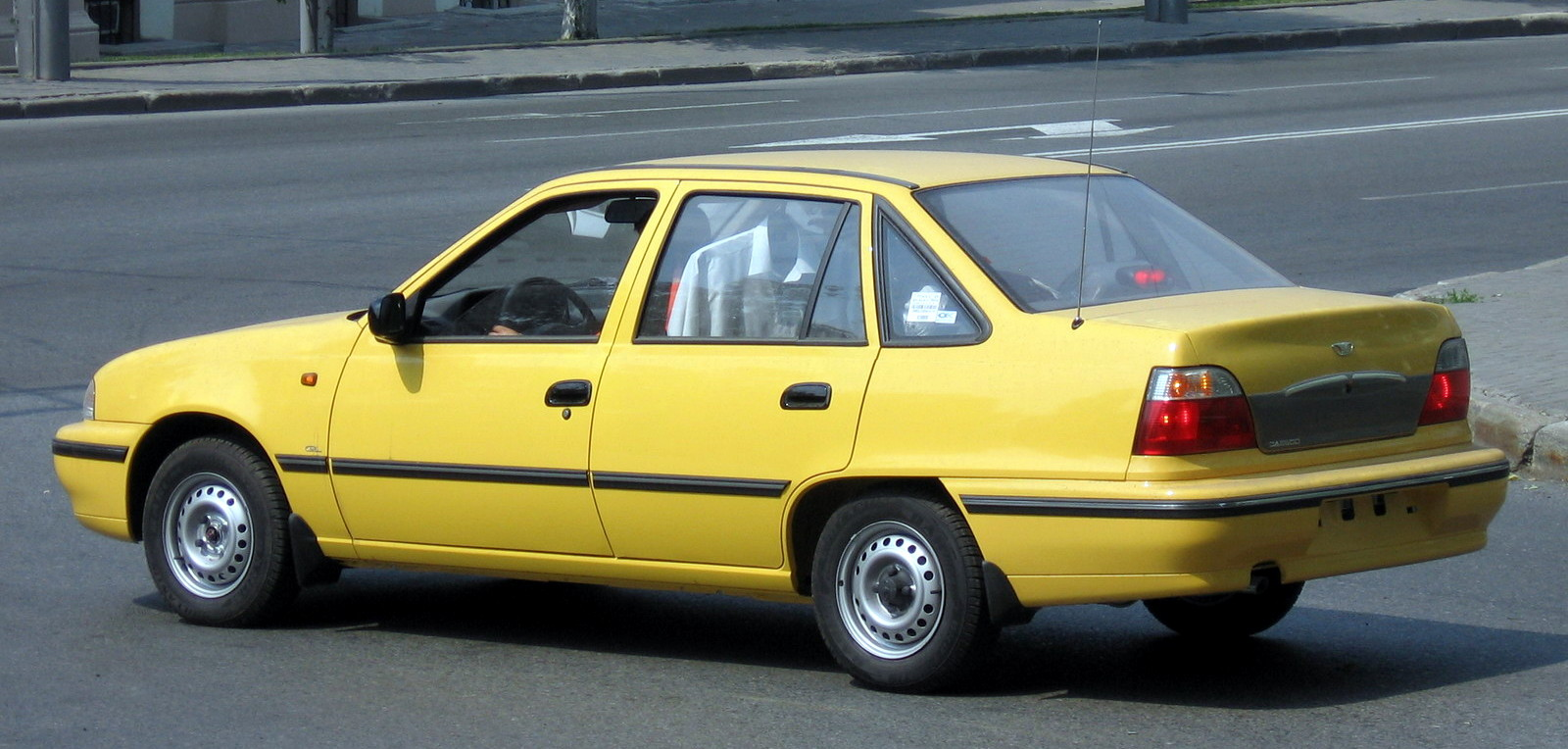 Photo taken in Tomsk, Russia